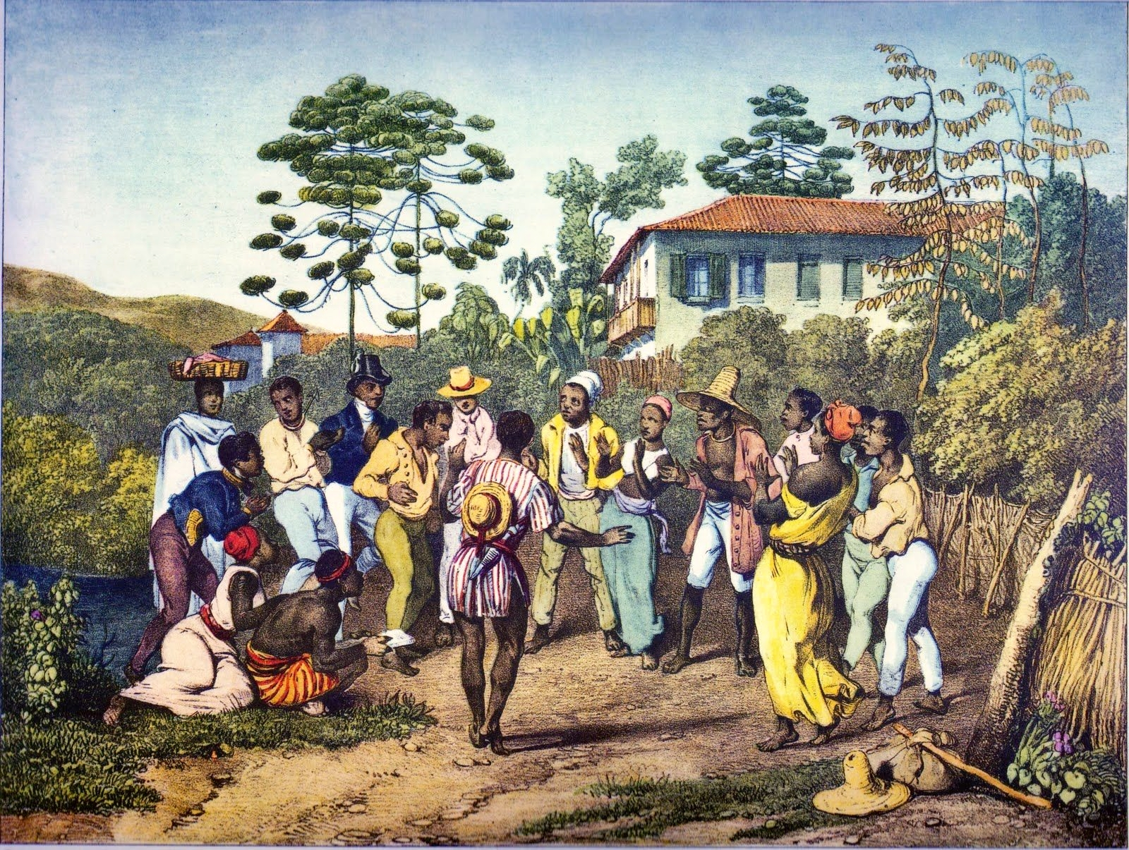 Johann Moritz Rugendas (Augsburg, 29 de março de 1808 — Weilheim, 29 de maio de 1858) foi um pintor alemão que viajou por todo Brasil durante 1822-1825 e pintou povos e costumes.